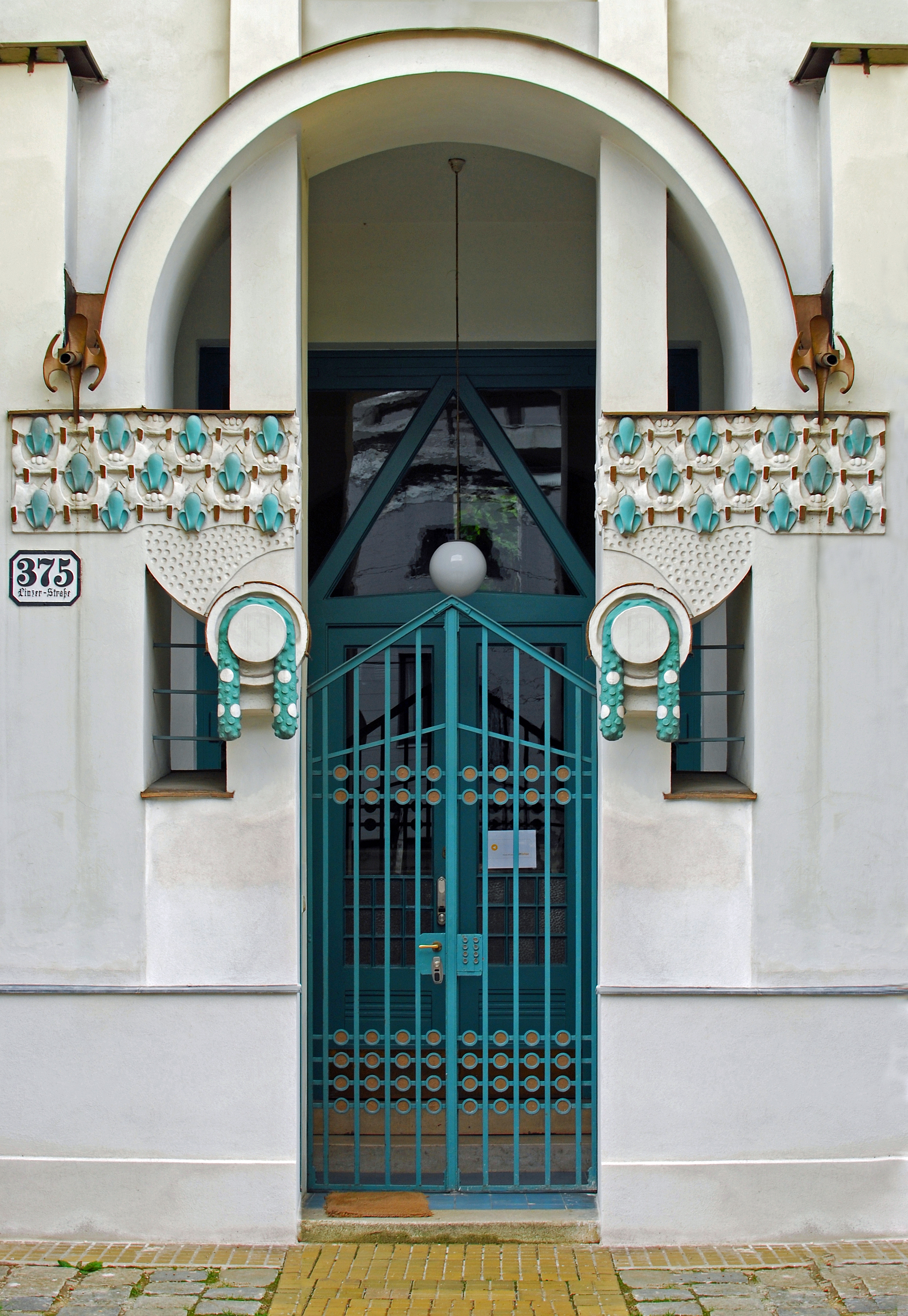 Villa Vojcsik, Eingang